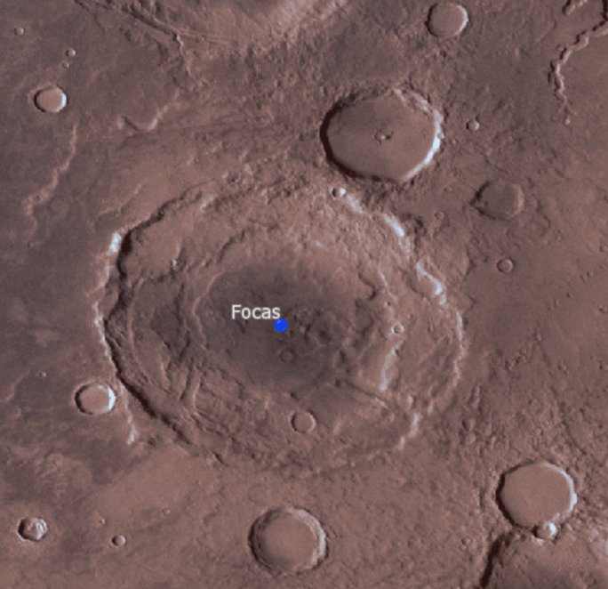 Cráter marciano Focas. (Imagen IAU/USGS/Goddard/A SU/USGS)